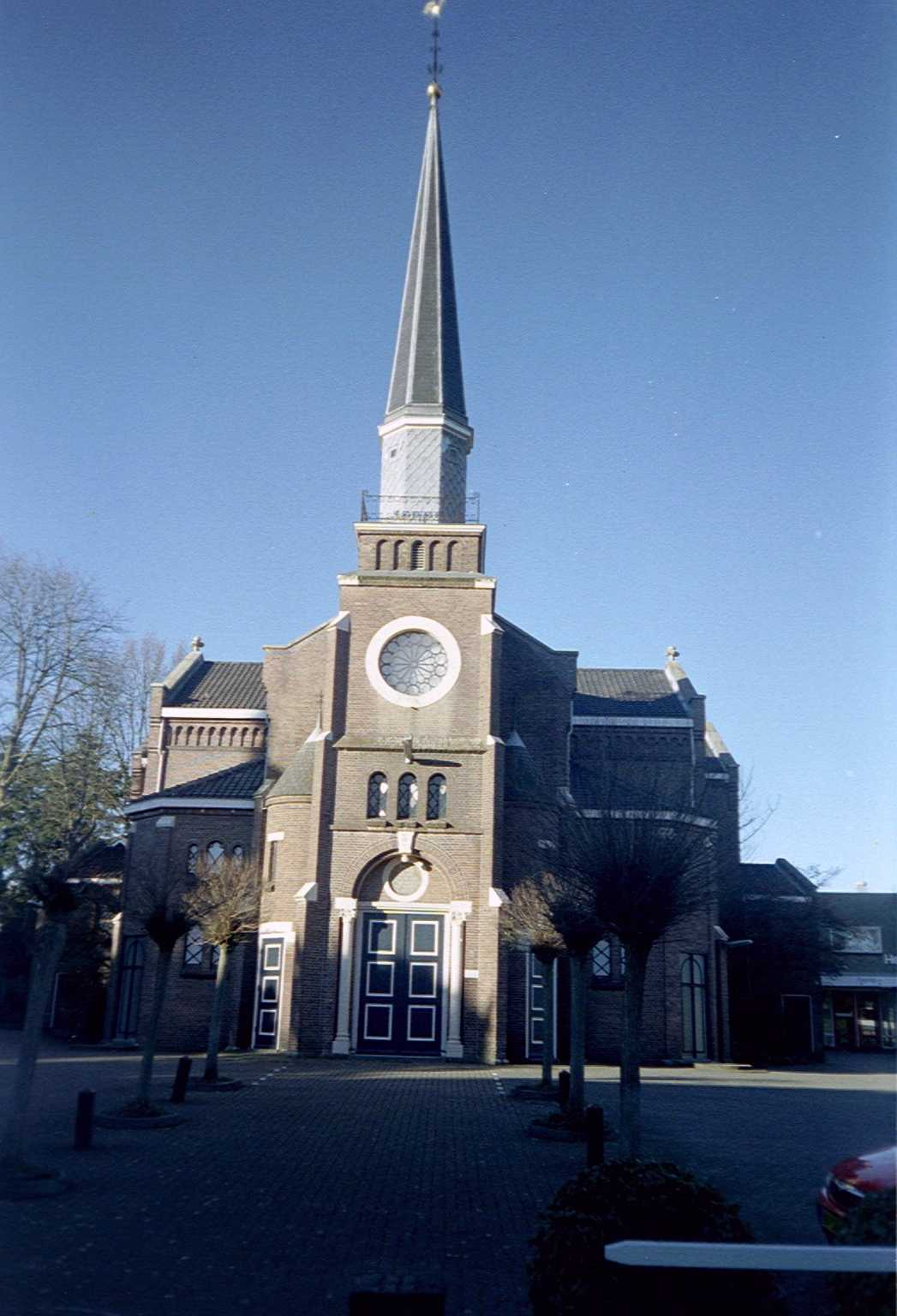 Paaskerk, Oude Utrechtseweg 2, Baarn. Foto genomen op 7 dec. 2003 en geüpload door maker.